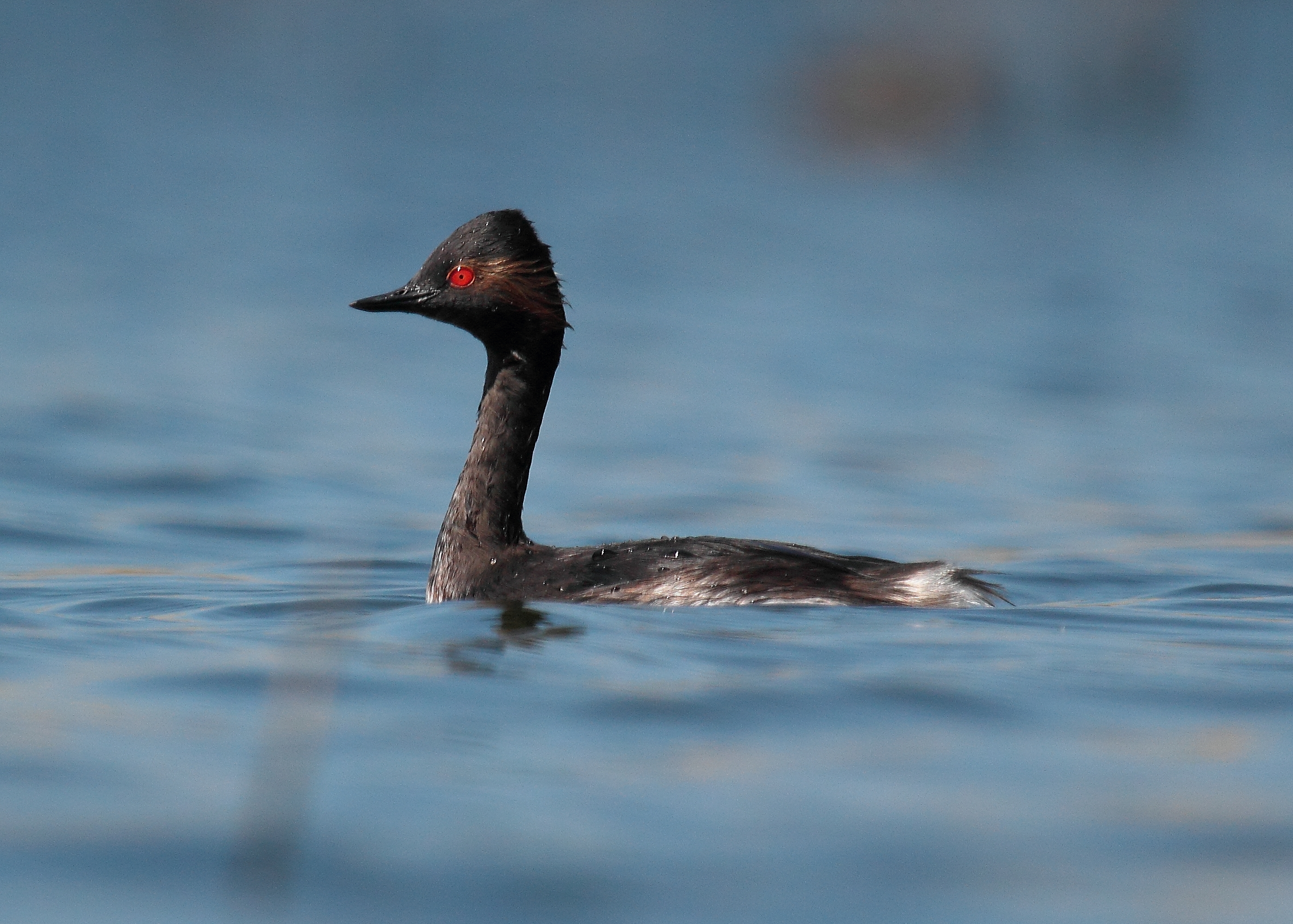 Podiceps nigricollis, El Puerto de Santa María, Andalusia, Spain